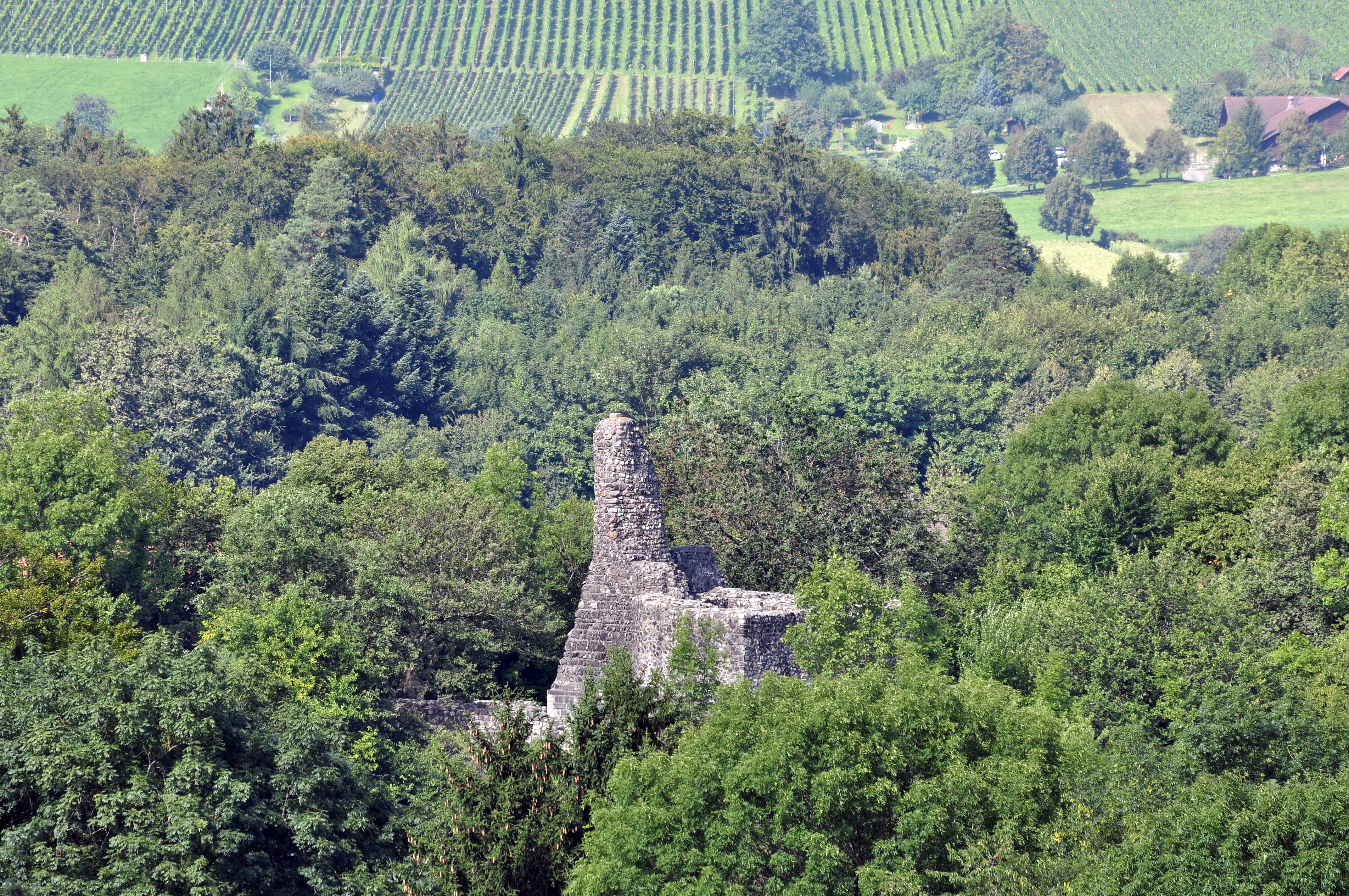 Altburg (Alt-Regensberg) in Regensdorf (Switzerland)